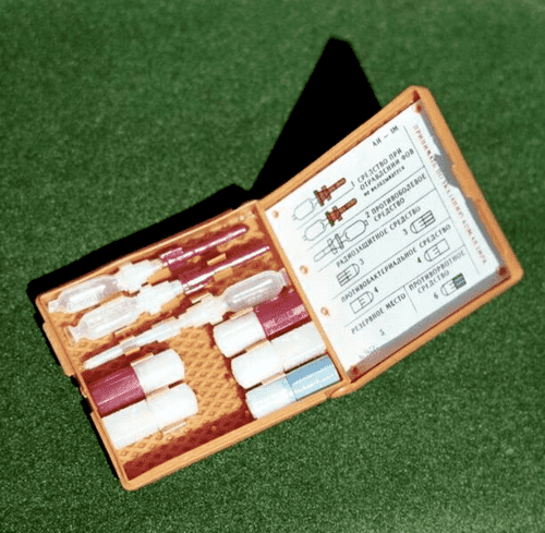 Аптечка індивідуальна АИ-1, містить протибольовий засіб, антидот, антирад, антибіотики, протирвотне. Застарілий засіб надання першої домедичної допомоги.